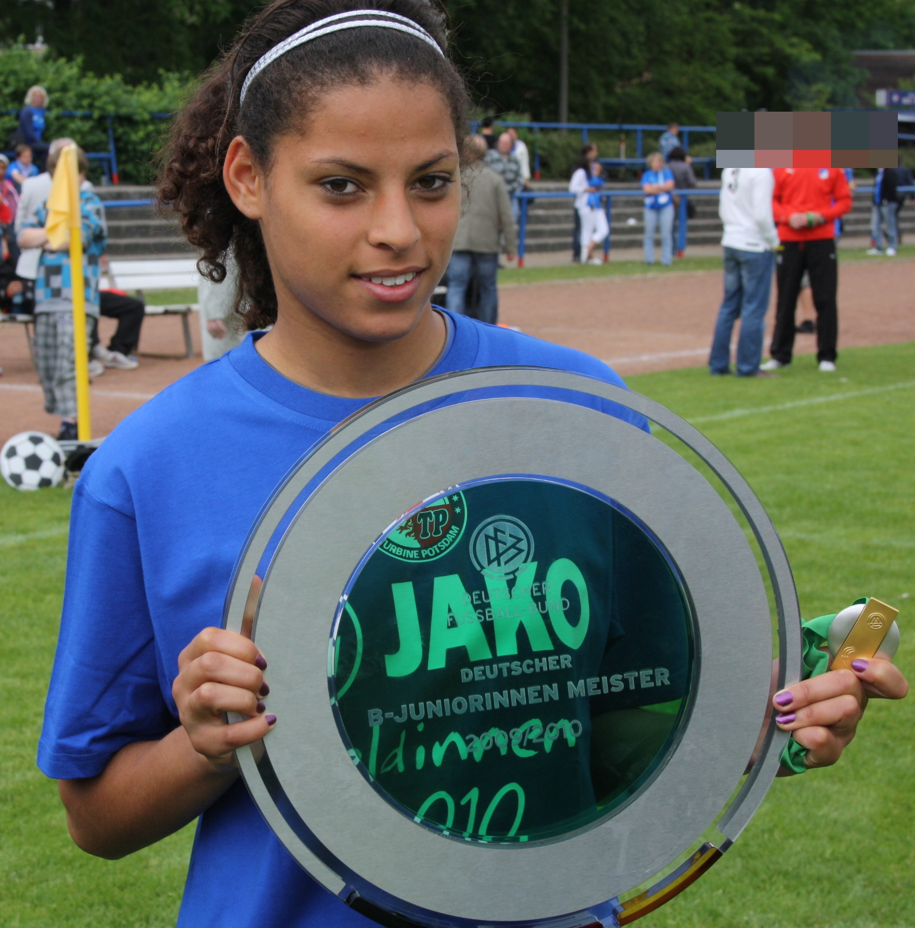 Erica Dillmann, Deutscher Fußballmeister B-Juniorinnen 2010